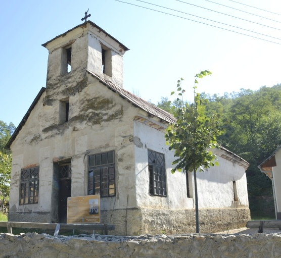 Biserica „Sf. Ilie”, sat Podeni; comuna Podeni În centrul satului 1859